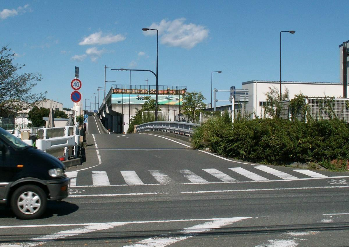 神奈川県道312号田谷藤沢線、川名付近